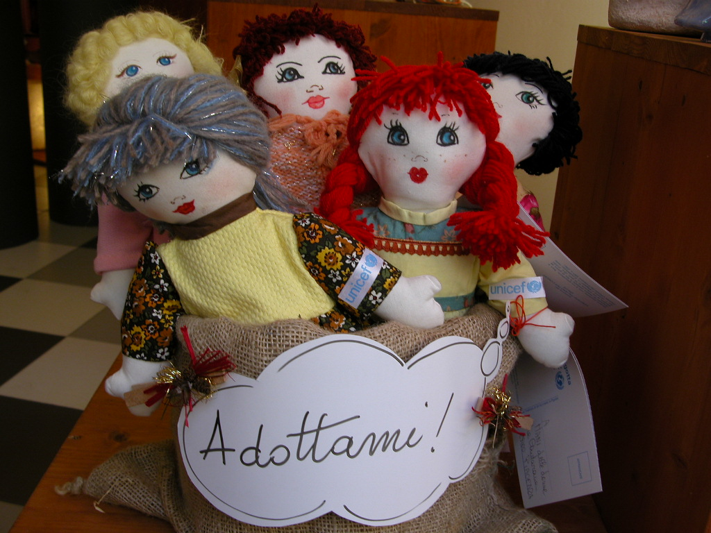 foto mia personale, pigotte di stoffa, 2007